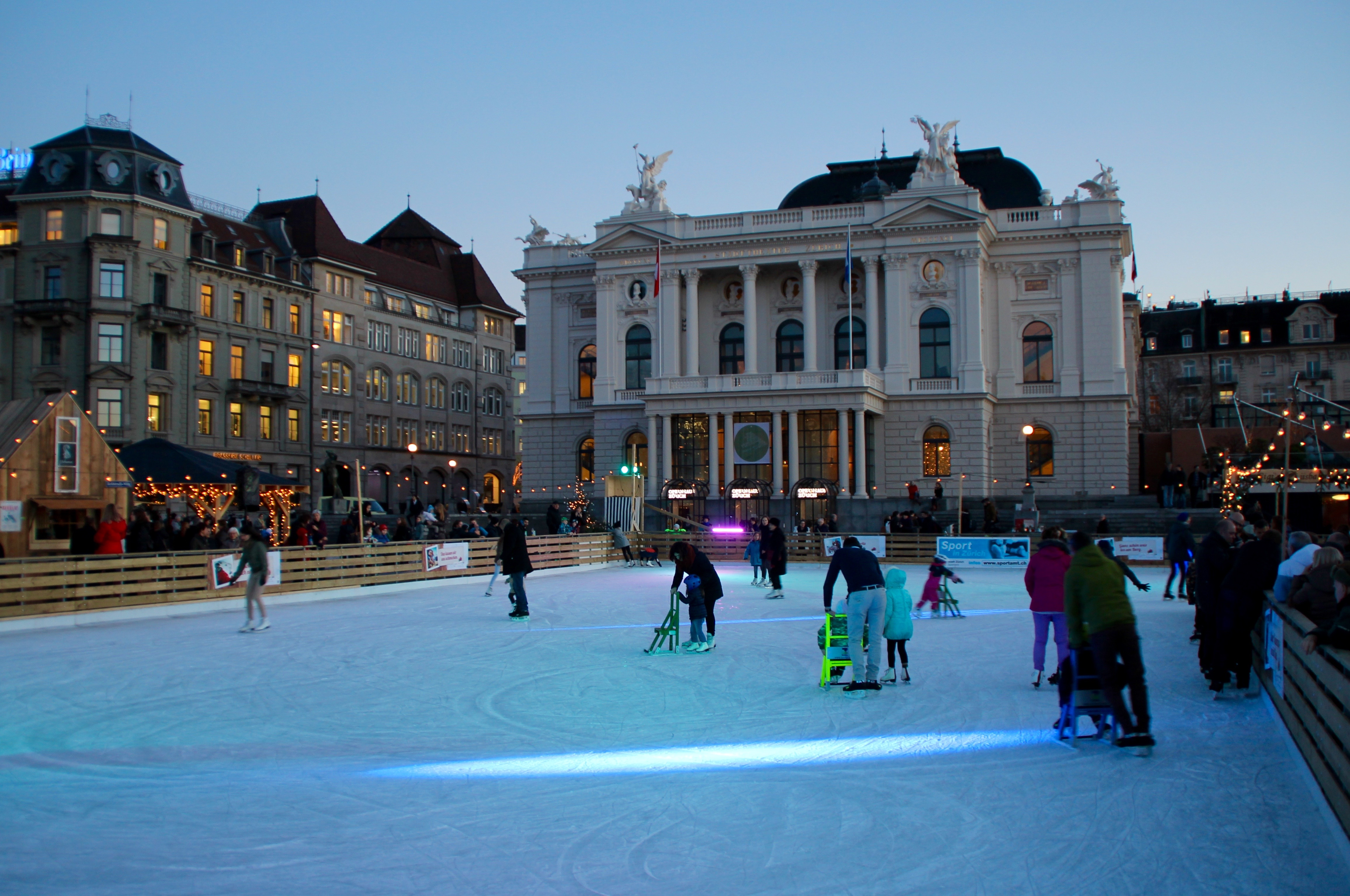 Eisfels auf dem Zürcher Sechseläutenplatz, Dezember 2015